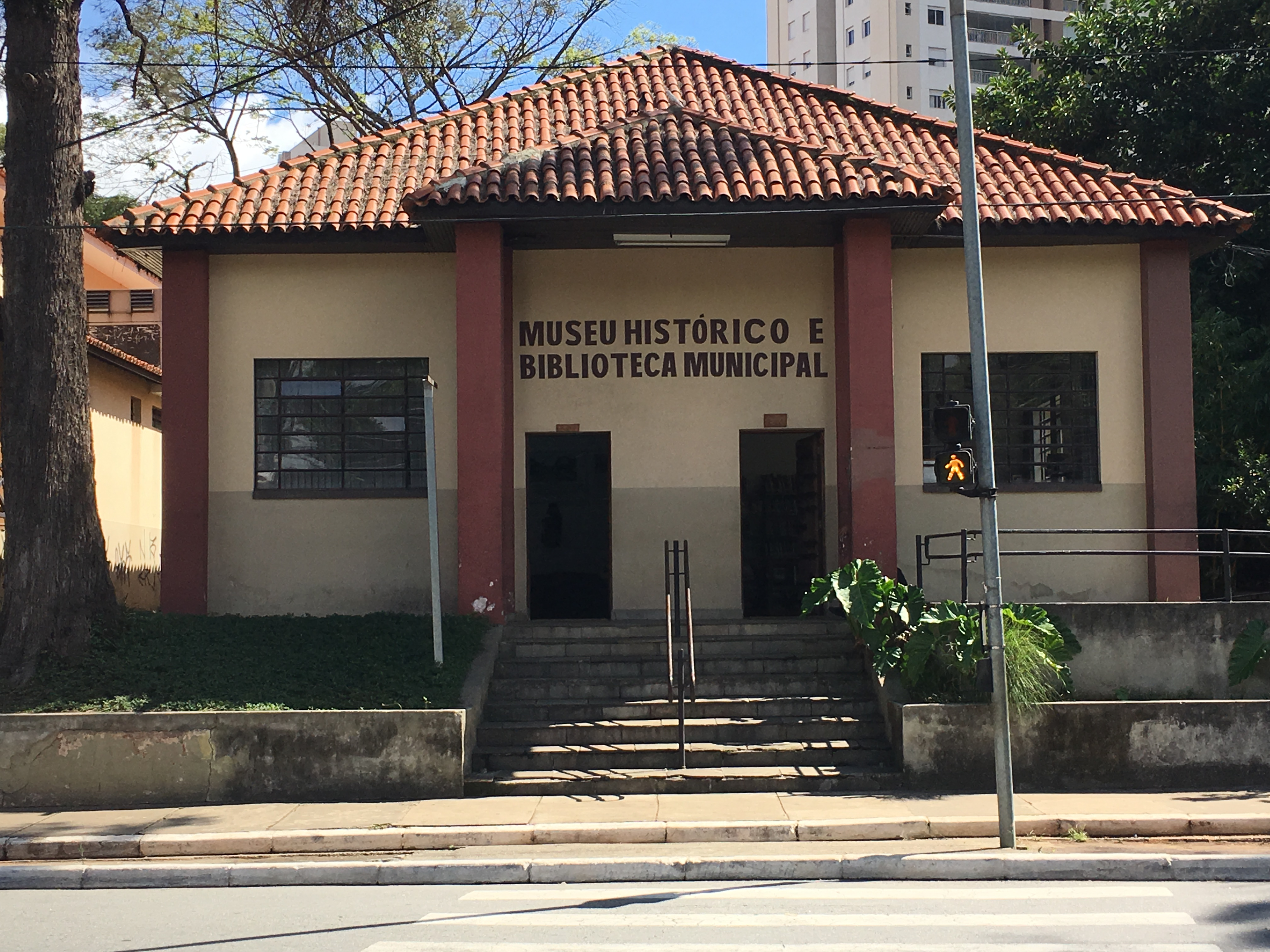 Museu Histórico Municipal de Guarulhos visto de frente.